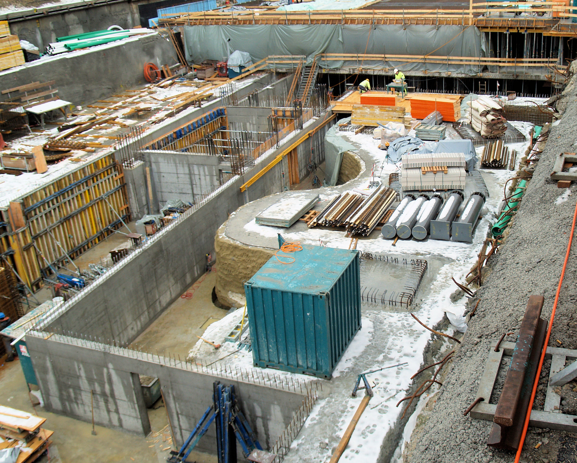 Das 3. UG des neuen Bahnhofs Aarau während des Baus. Unter dem gewundenen Erdteil befinden sich die Meyerschen Stollen.